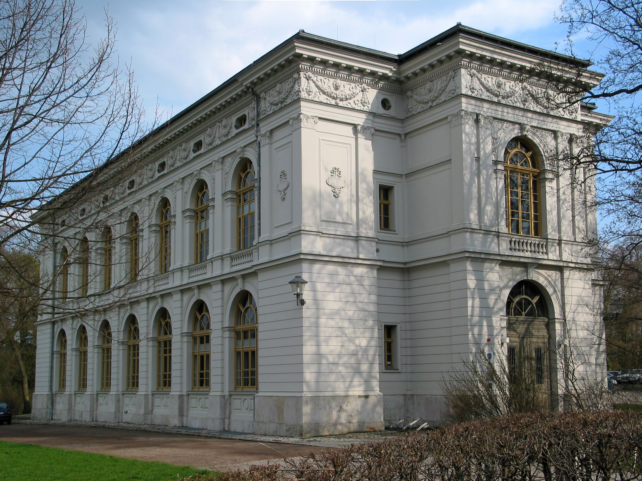 Das Thüringische Hauptstaatsarchiv Weimar am Beethovenplatz (beinhaltet die Archiv-Bestände bis zum Jahr 1920).